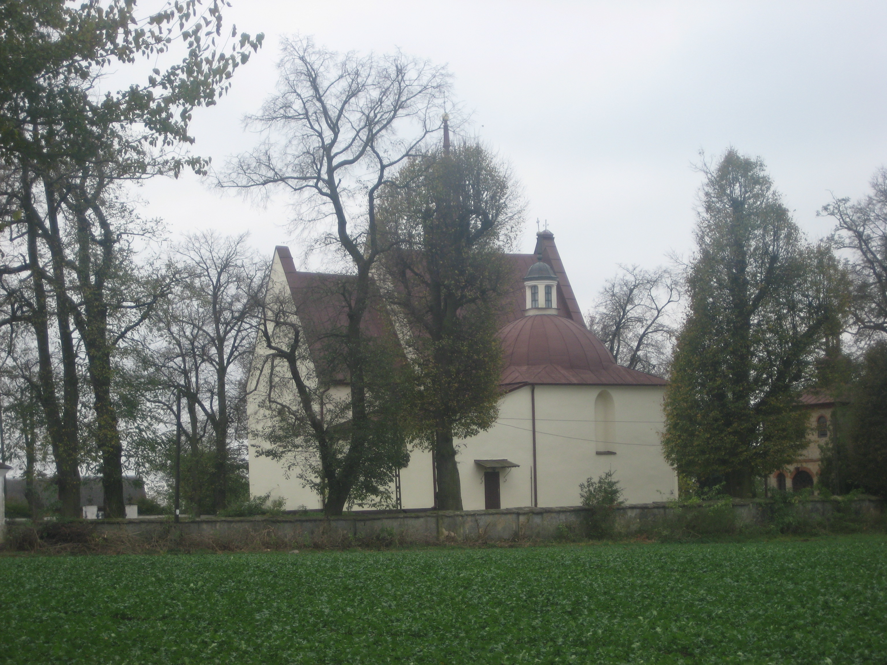 Kościół św. Wojciecha w Wojciechowicach